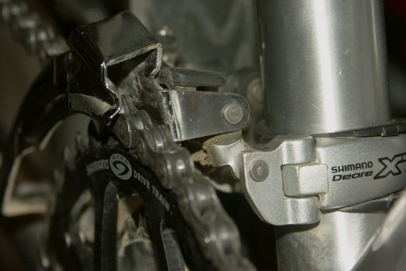 Topswing Umwerfer für Mountainbikes vom Hersteller Shimano.